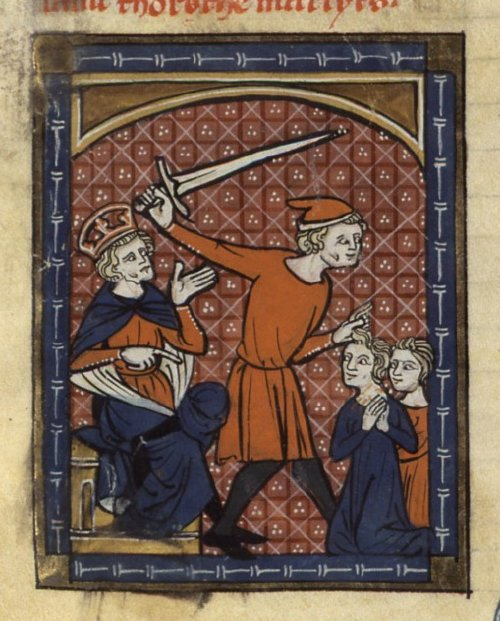 Martyre de saint Gorgon et de sainte Dorothée